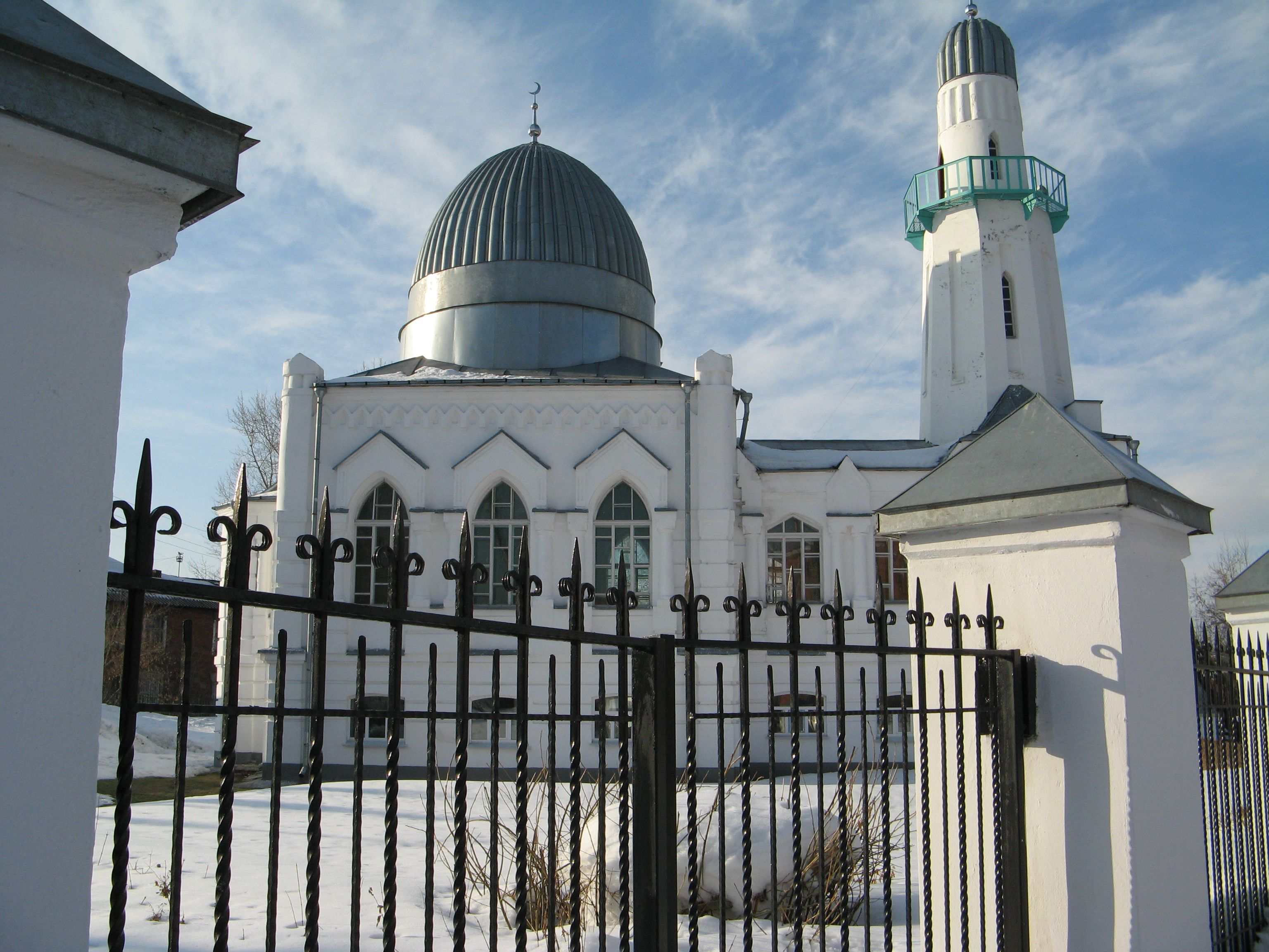 Белая Соборная мечеть (Томск, Московский тракт). Построена по проекту томского архитектора А.П. Лангера в 1900 году. К 1999 году восстановлена в первозданном виде.